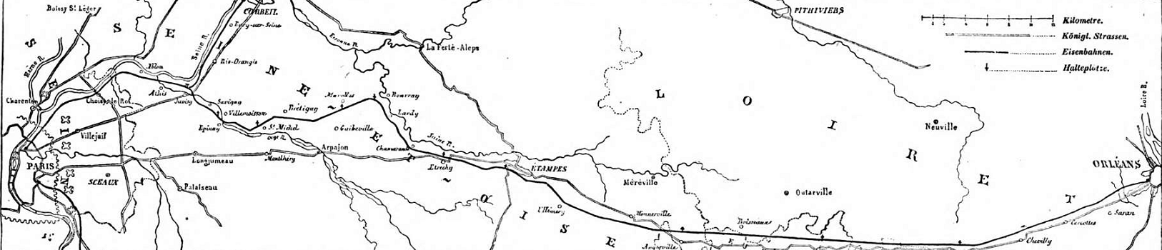 Karte der Eisenbahn von Paris nach Orleans